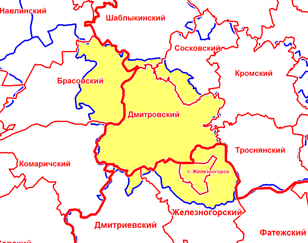 Дмитровский уезд Орловской губернии в современной сетке районов